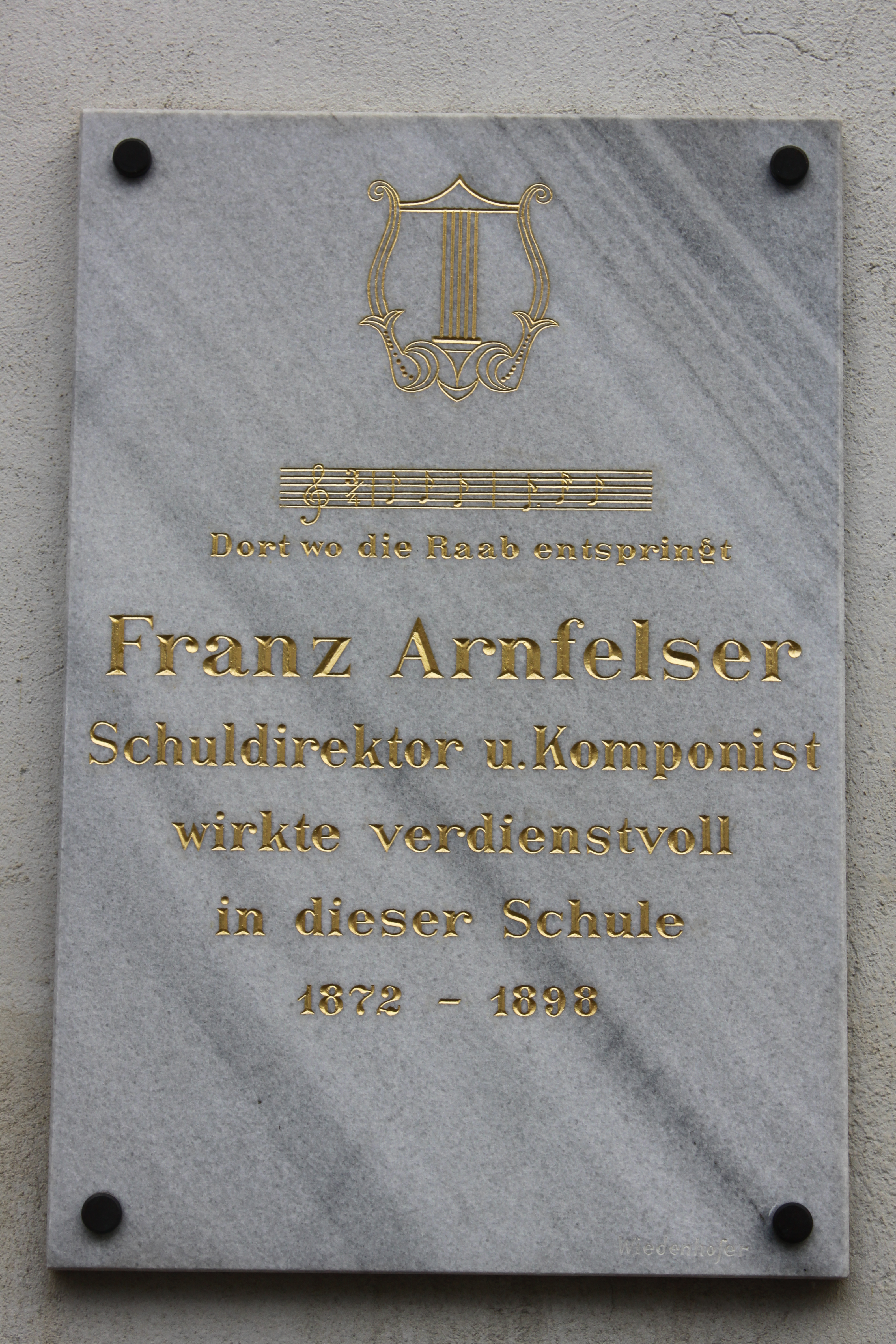 Franz Arnfelser, von 1872 bis 1898 Direktor der Schule in Passail, vermutlich ehemaliges Wohnhaus von Arnfelser auf Passail 15, Gedenktafel, Komponist, Liedtext: Dort wo die RaabRaab entspringt